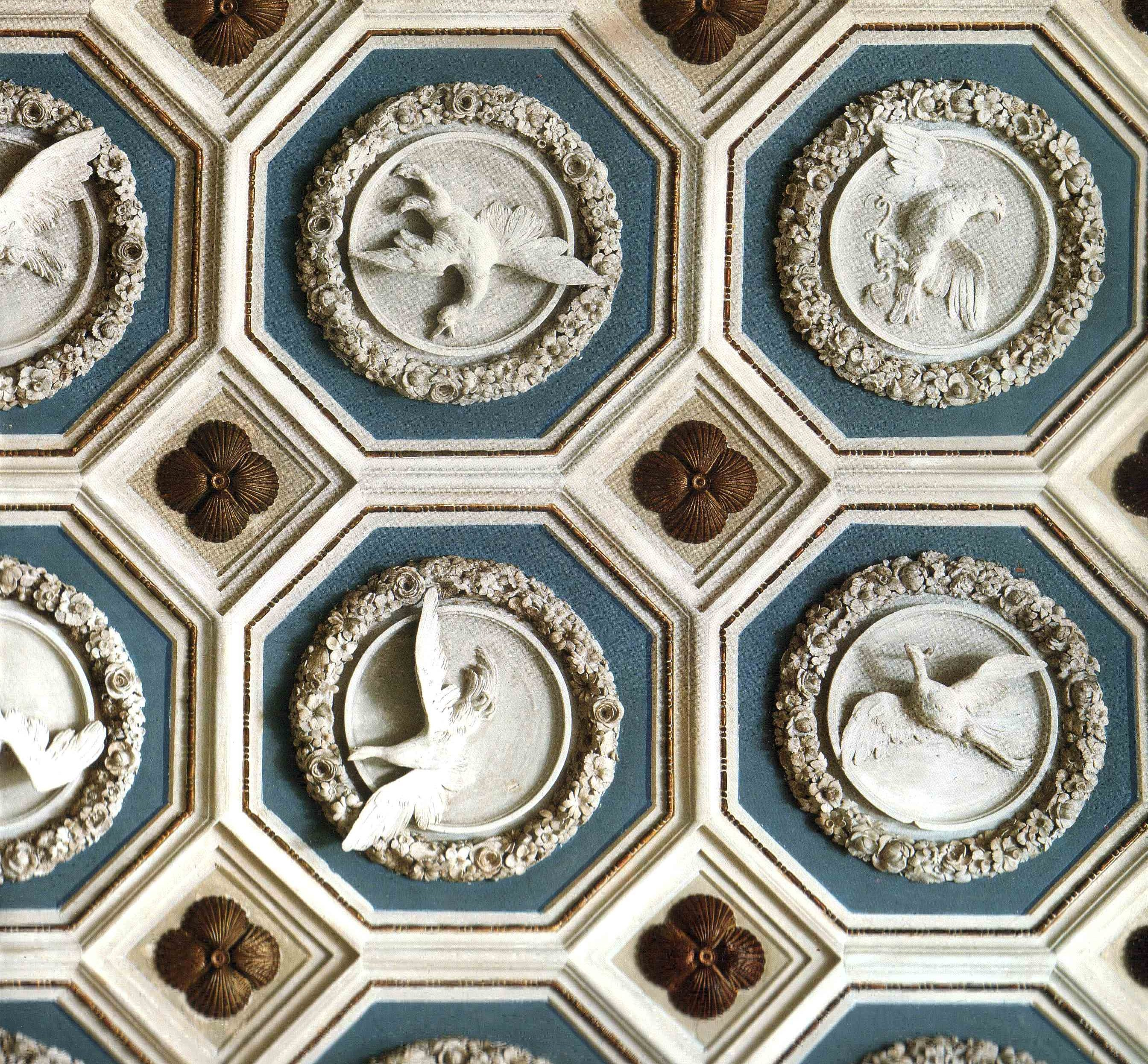 Particolare del soffitto della Sala degli uccelli del palazzo del Giardino di Parma, decorato a stucco da Benigno Bossi con 224 specie di uccelli.